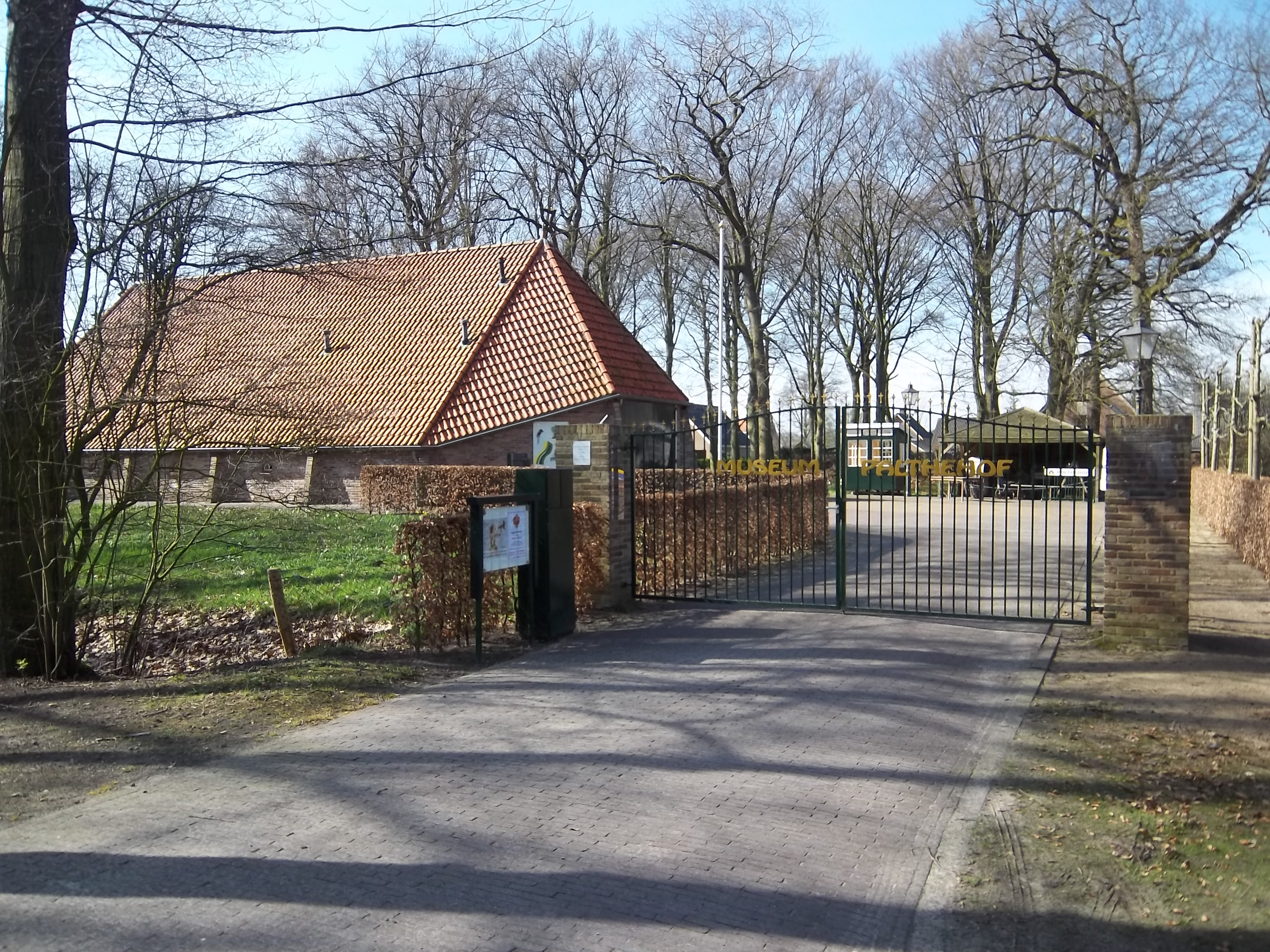 Museum Palthehof in Nieuwleusen